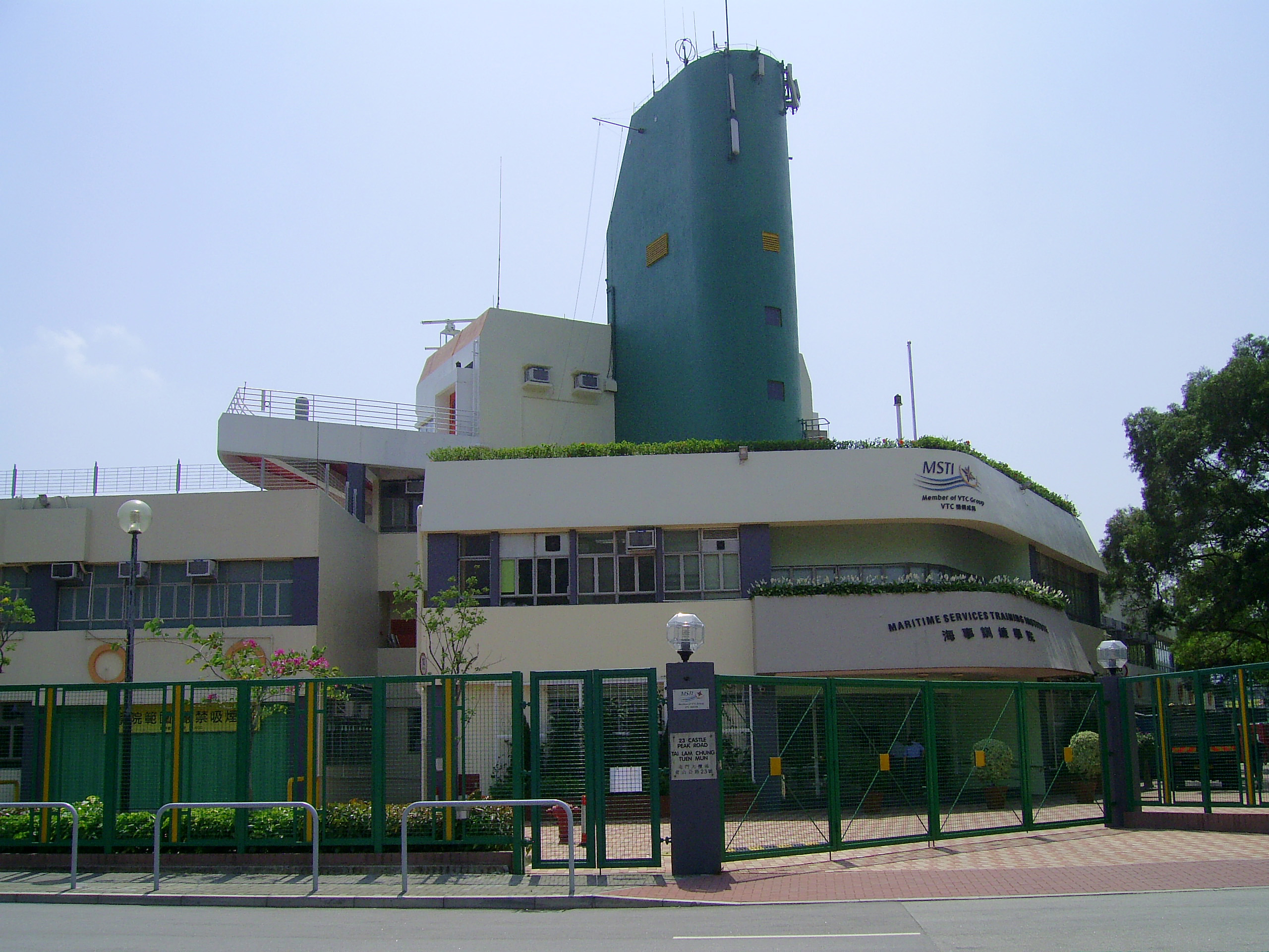 中文（香港）: 海事訓練學院校舍